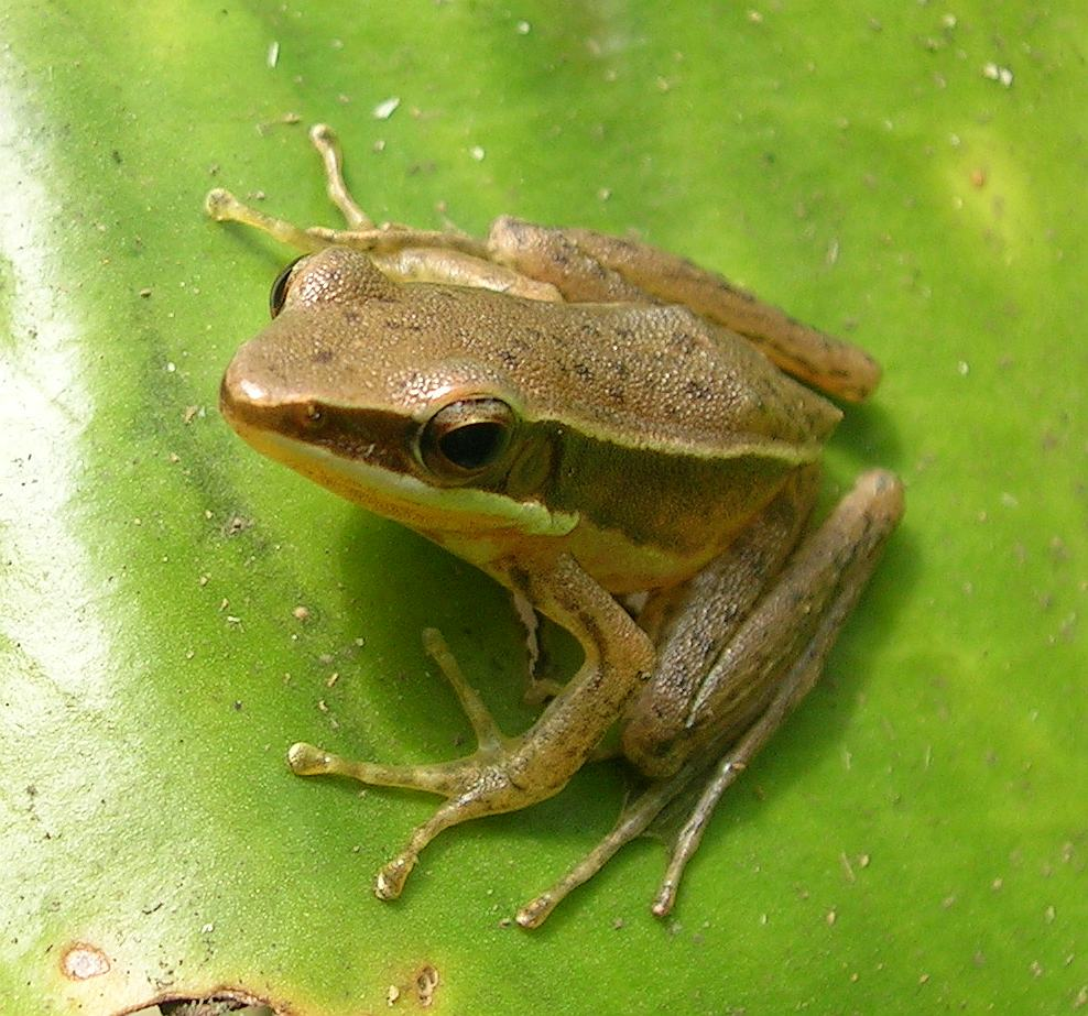 Young Rana temporalis from Wayanad, India